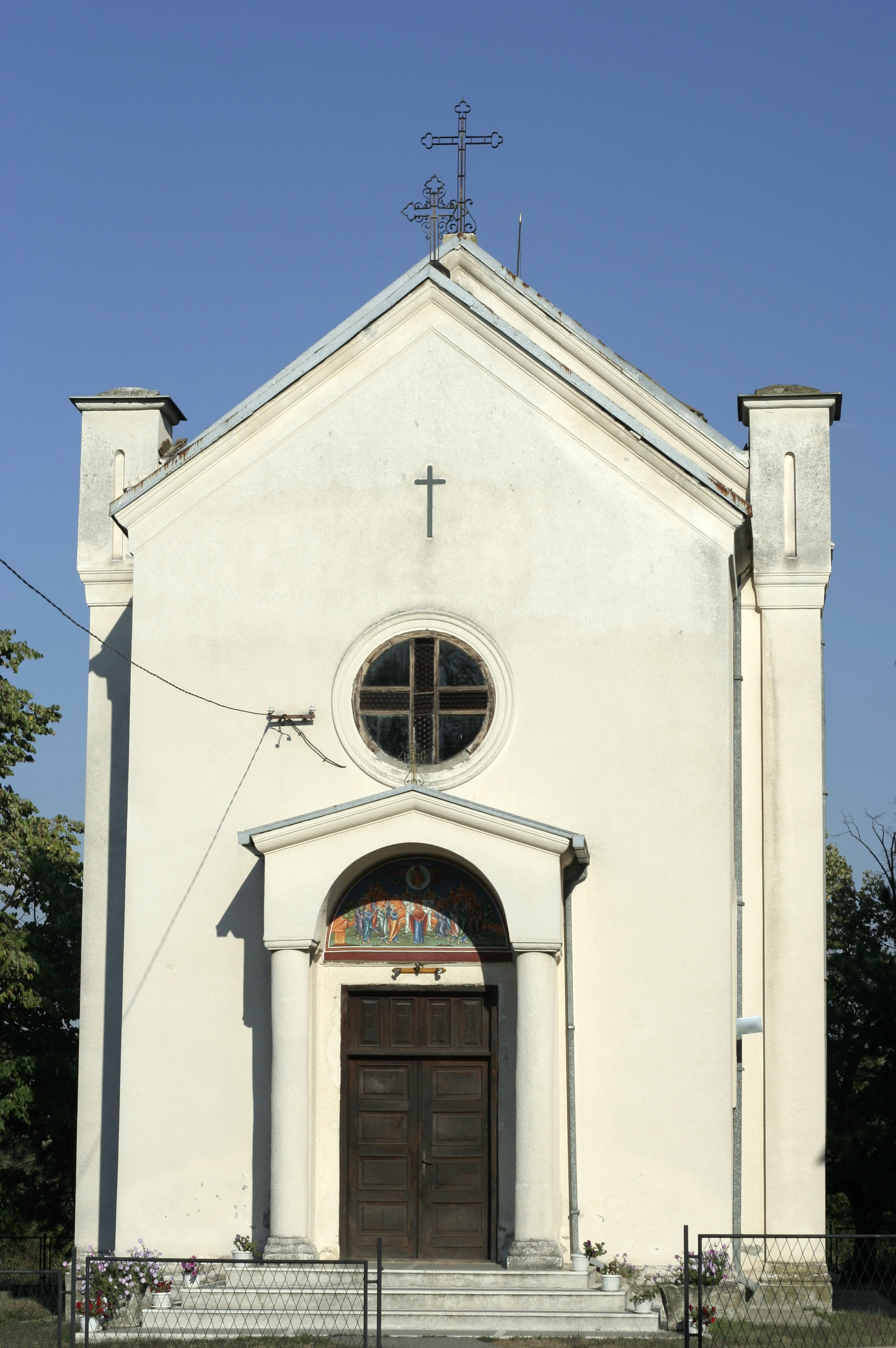 Црквa Св. Вазнесења у Дрену